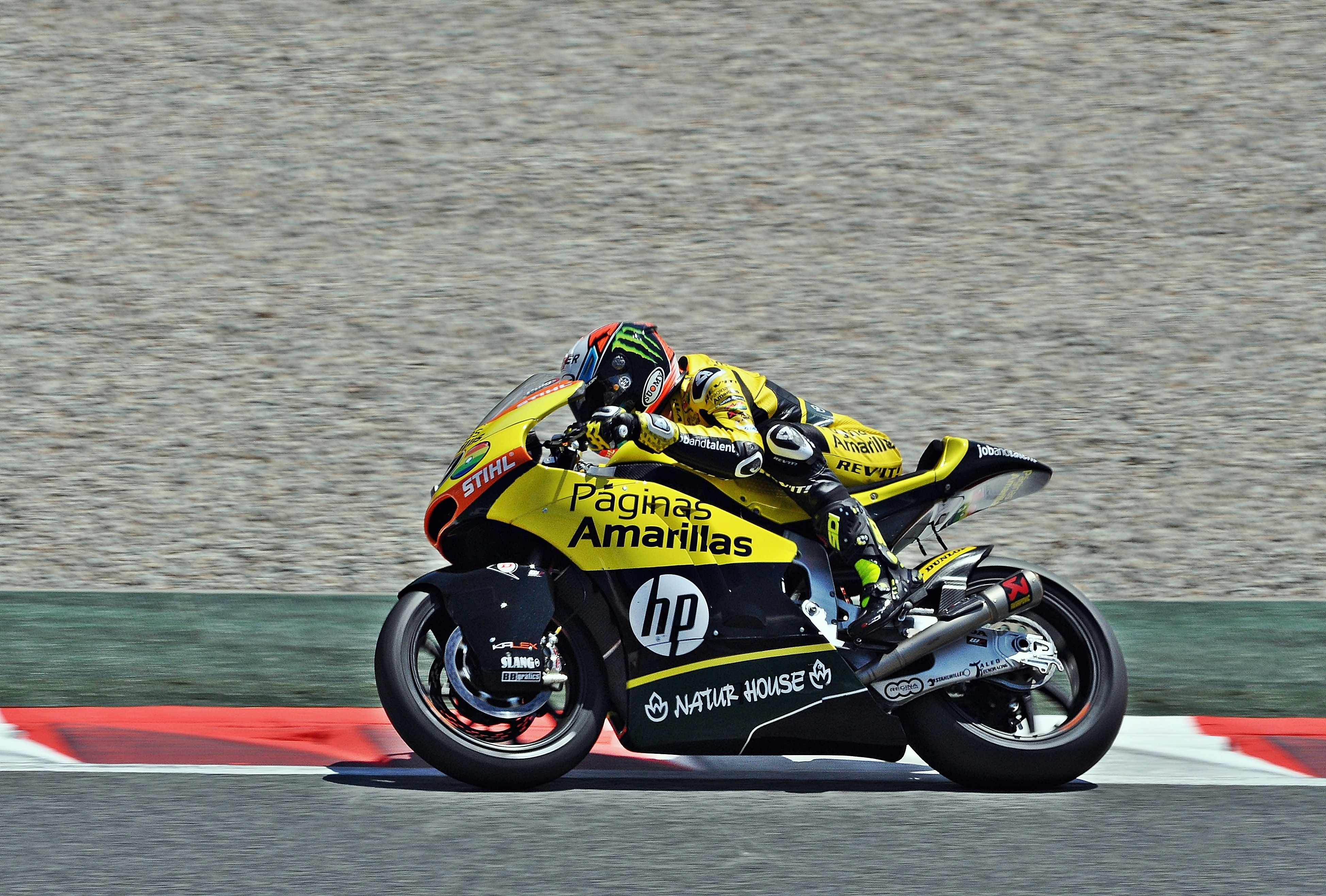 gran premio de cataluña